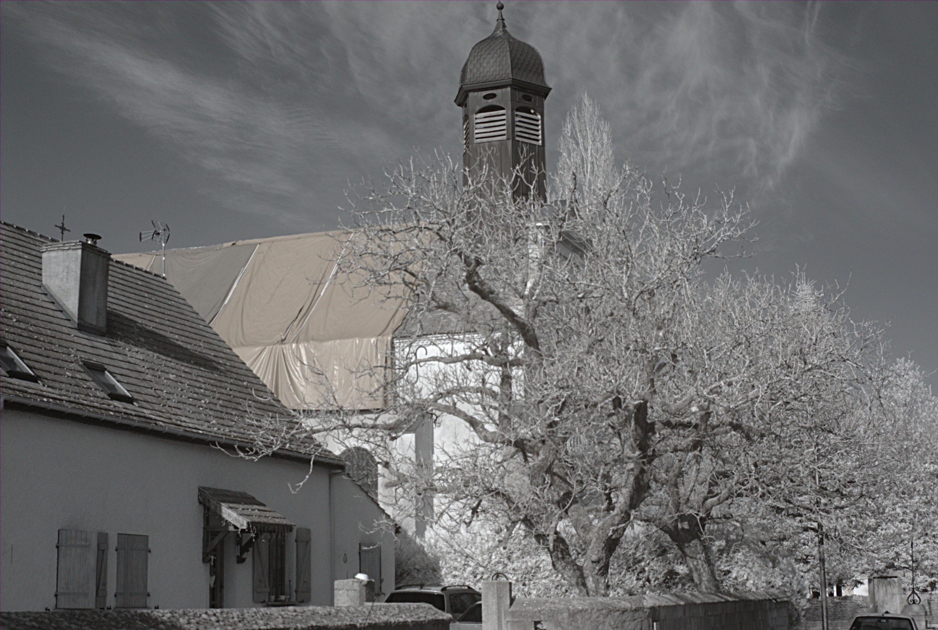 Clocher, Église paroissiale Saint-André, Broin (Côte d'Or, Bourgogne, France) photographié avec un filtre infrarouge 760 nm.